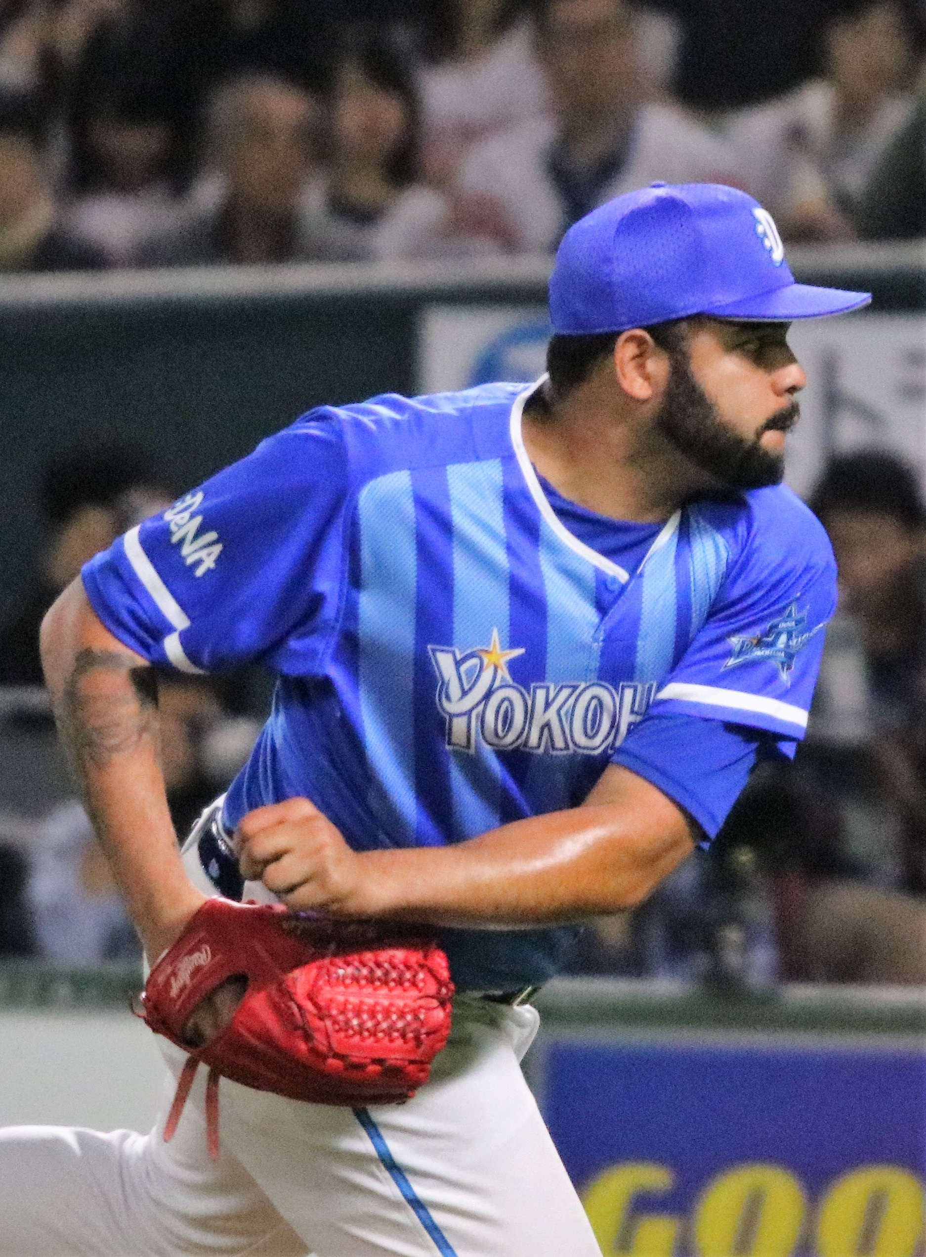 2017/10/29 日本シリーズ第2戦